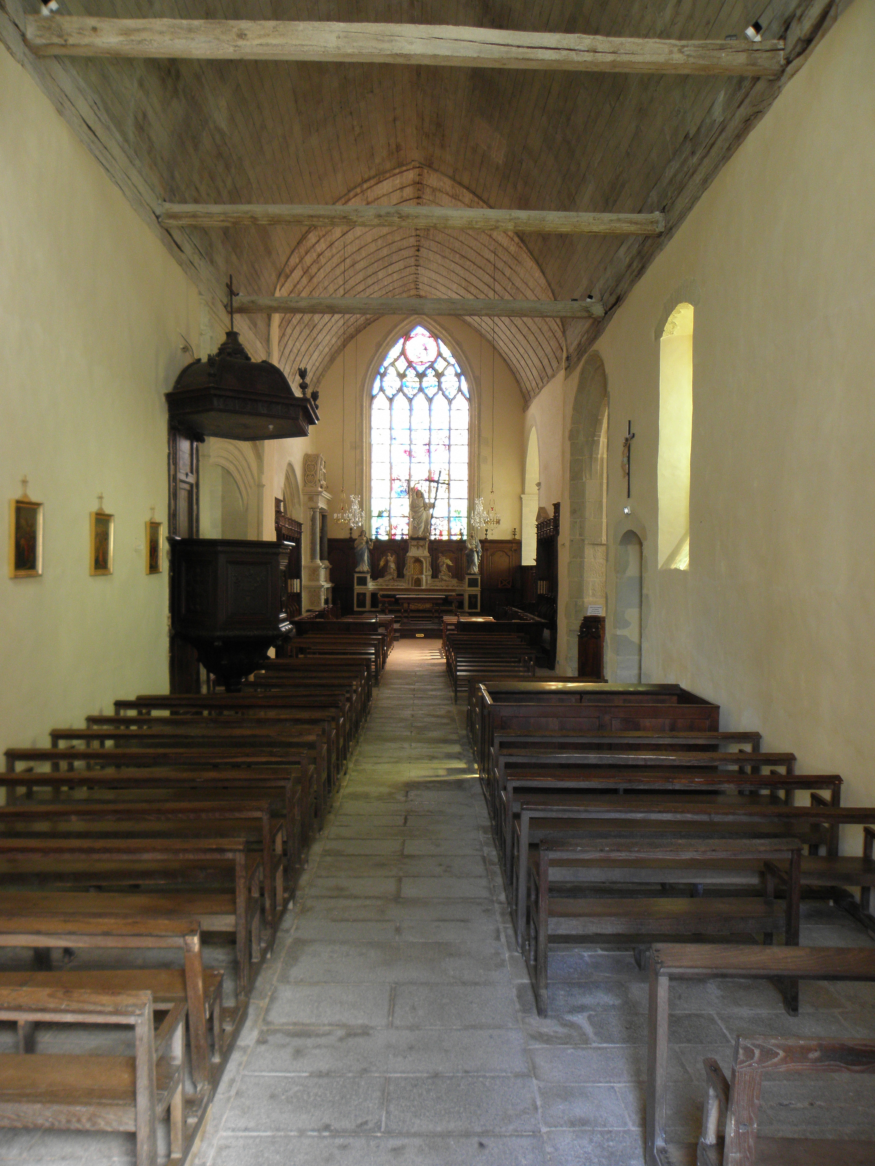 Intérieur de la collégiale Sainte-Marie-Madeleine de Champeaux (35). Nef. Vue vers le levant.